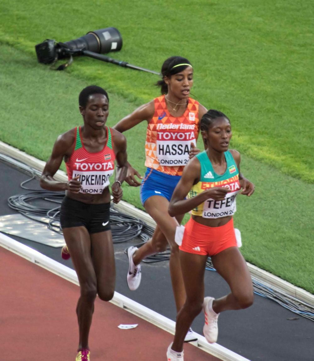 d9_7 finale 5000m hassan